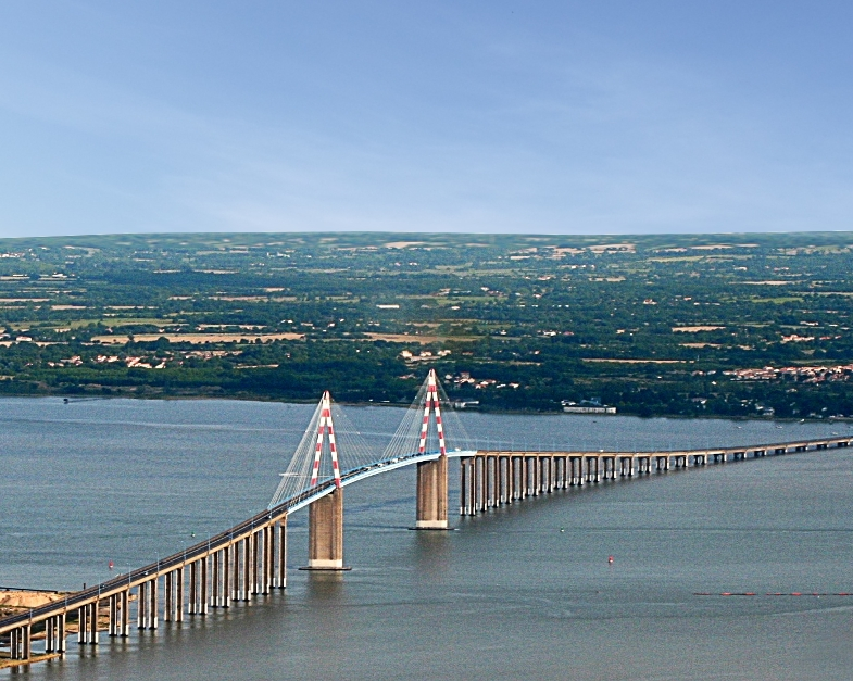 Pont de Saint-Nazaire, vue aérienne